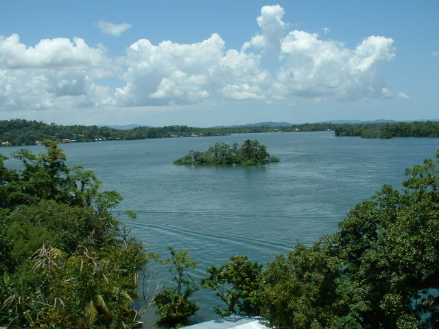 Río Dulce desde el puente